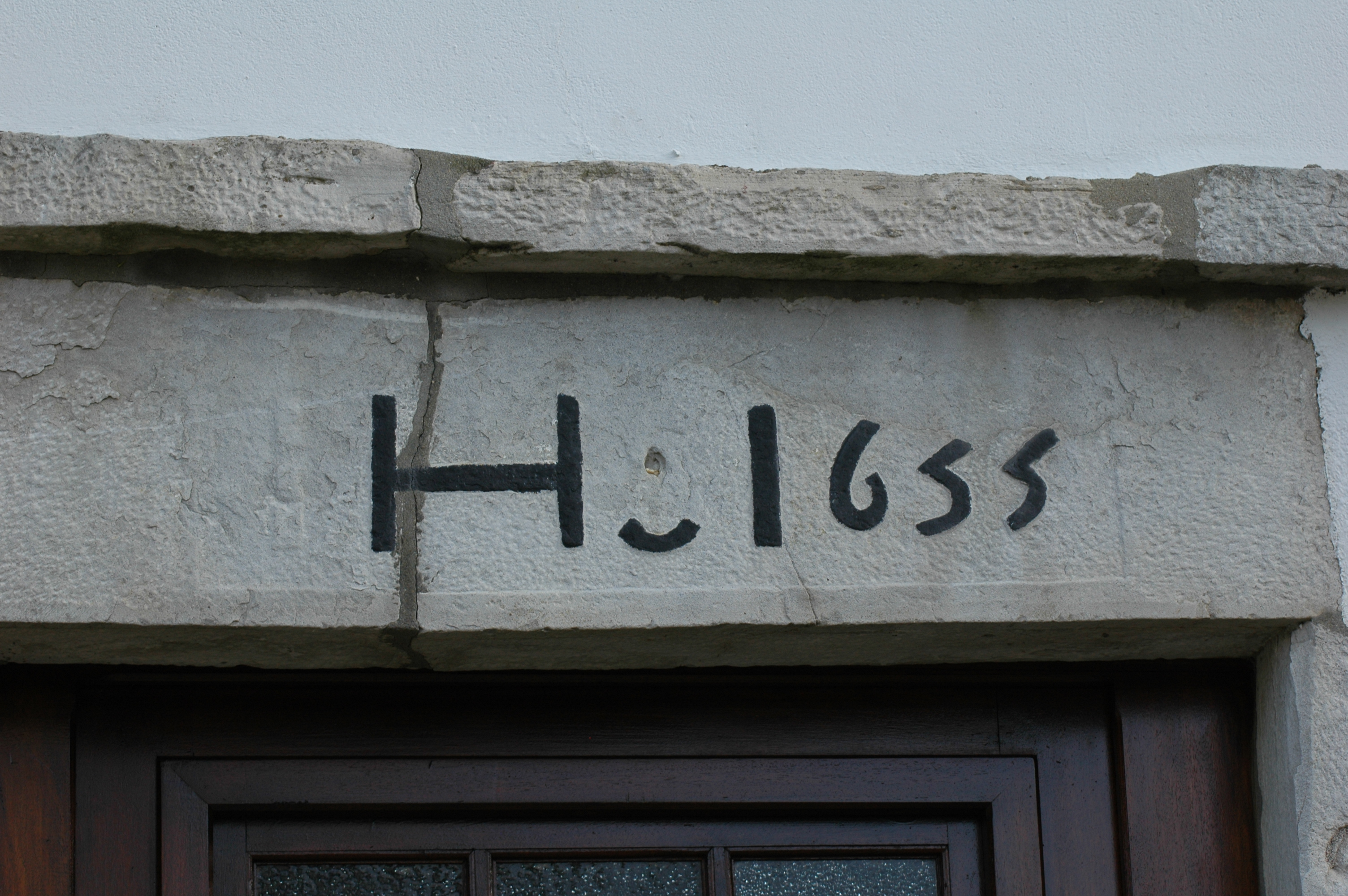 Ahetze, linteau datant de 1655